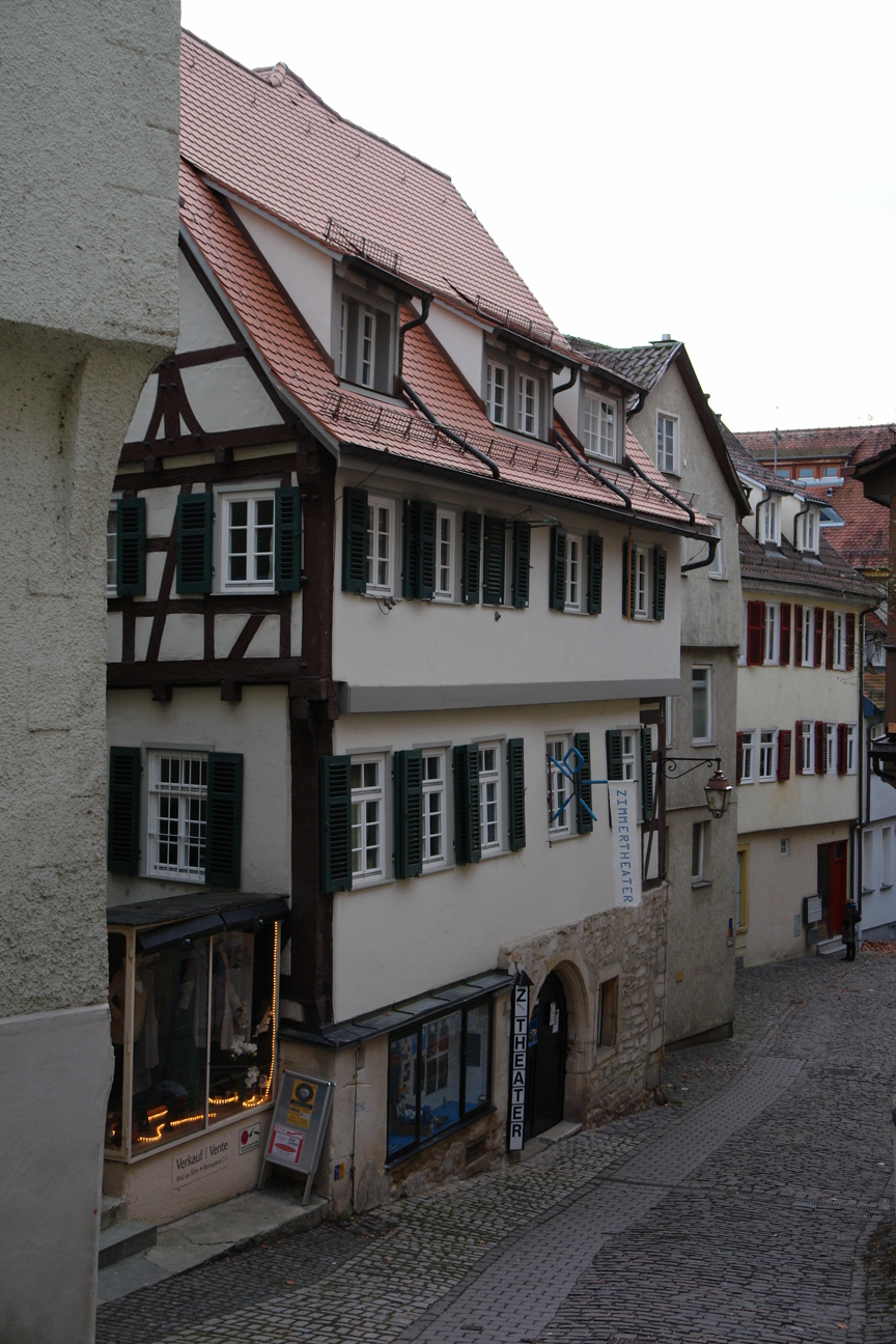 Zimmertheater Tübingen GmbH, Bursagasse 16, 72070 Tübingen